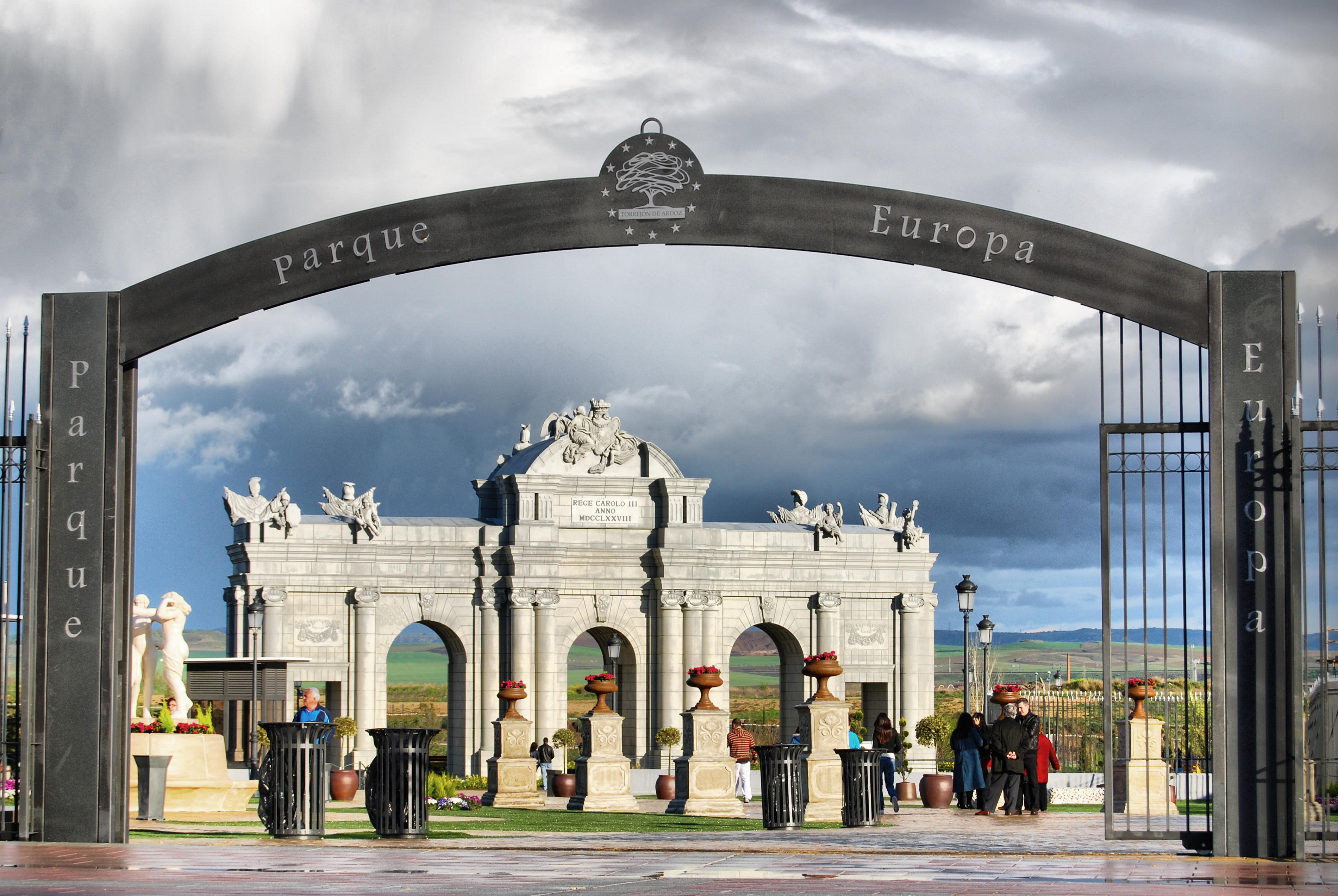 Foto de una de las dos entradas principales al Parque Europa con una réplica de la Puerta de Alcalá al fondo de la imagen.